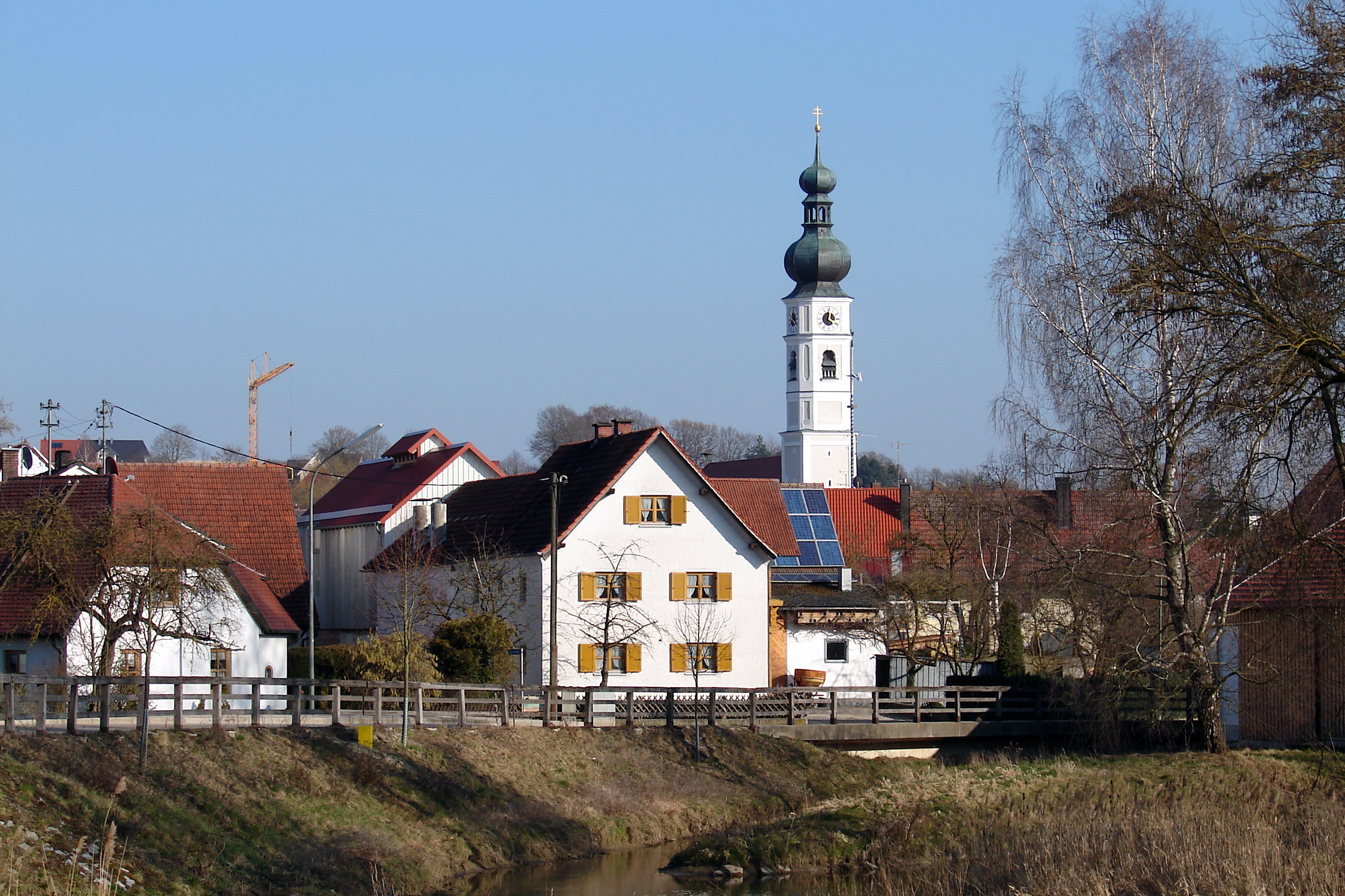 Elsendorf ist eine Gemeinde im niederbayerischen Landkreis Kelheim und Mitglied der Verwaltungsgemeinschaft Mainburg.